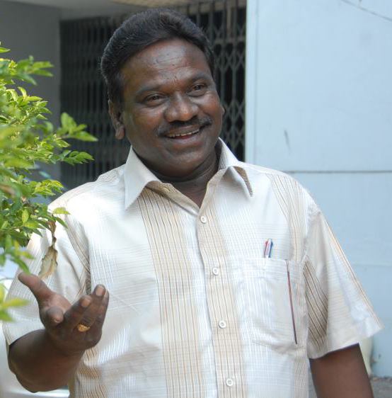 పైడి తెరేష్ బాబు